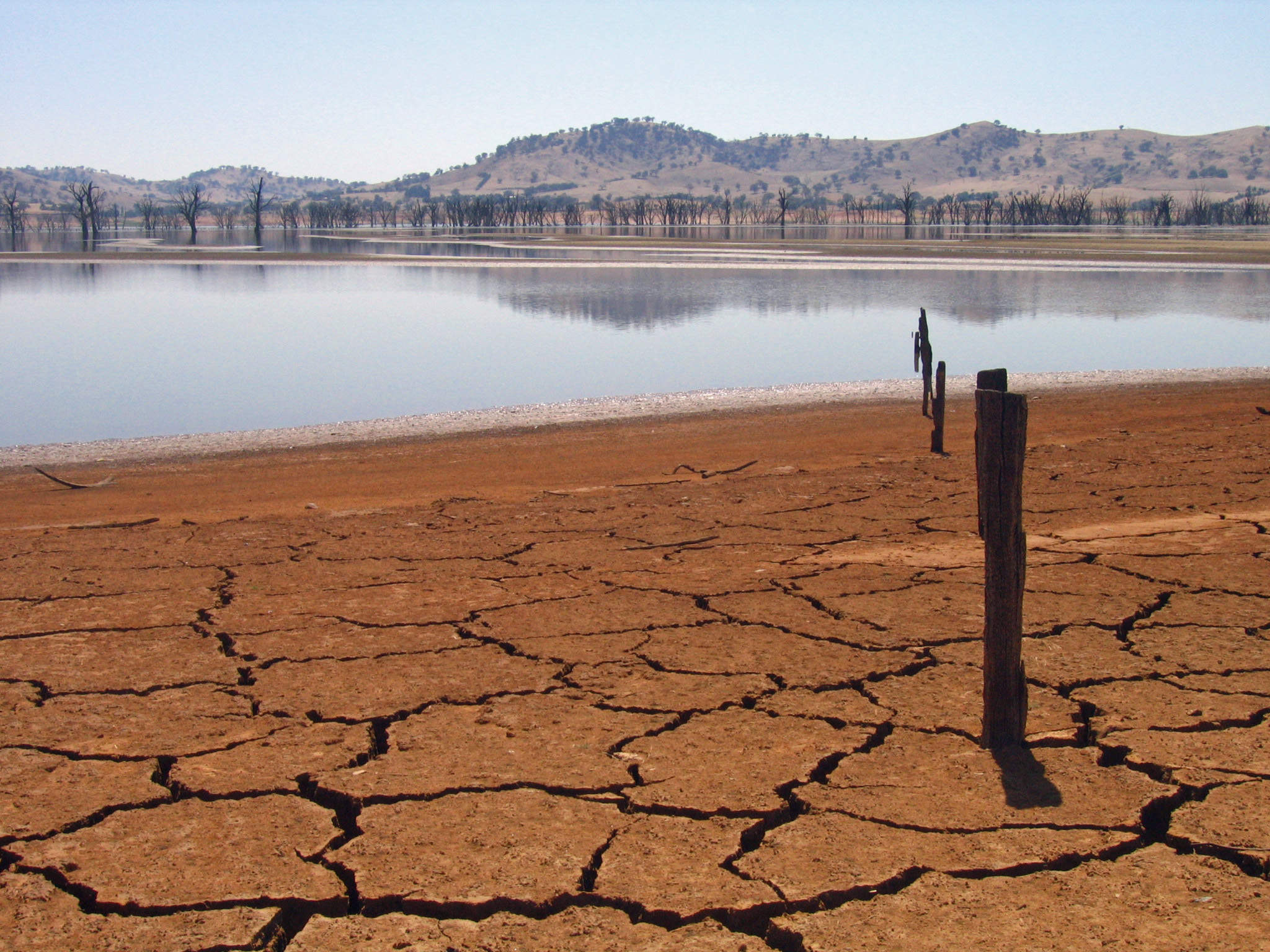 Le lac Hume près de Hume Weir